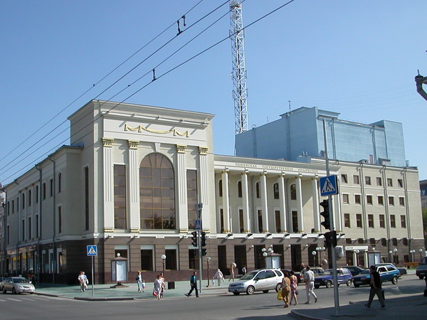 Тюменская филармония